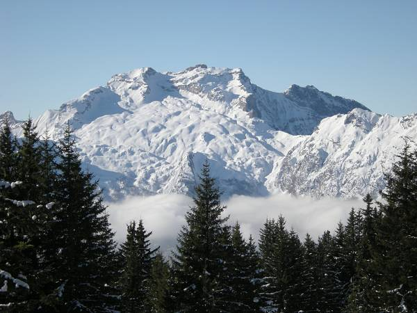 Versant est de la Tournette vu depuis les Aravis (près du col de la Croix Fry)